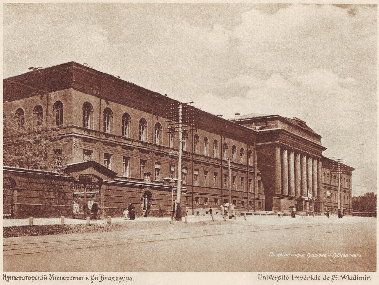 Університет Св.Володимира Київ 1911